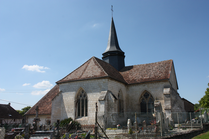 Église Saint-Léonard de Bréban (Inscrit) .